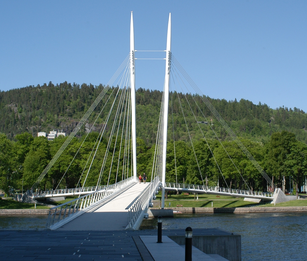 Ypsilon gangbro sett fra Strømsøsiden.